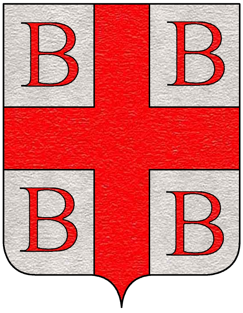 Stemma della famiglia Bonomi